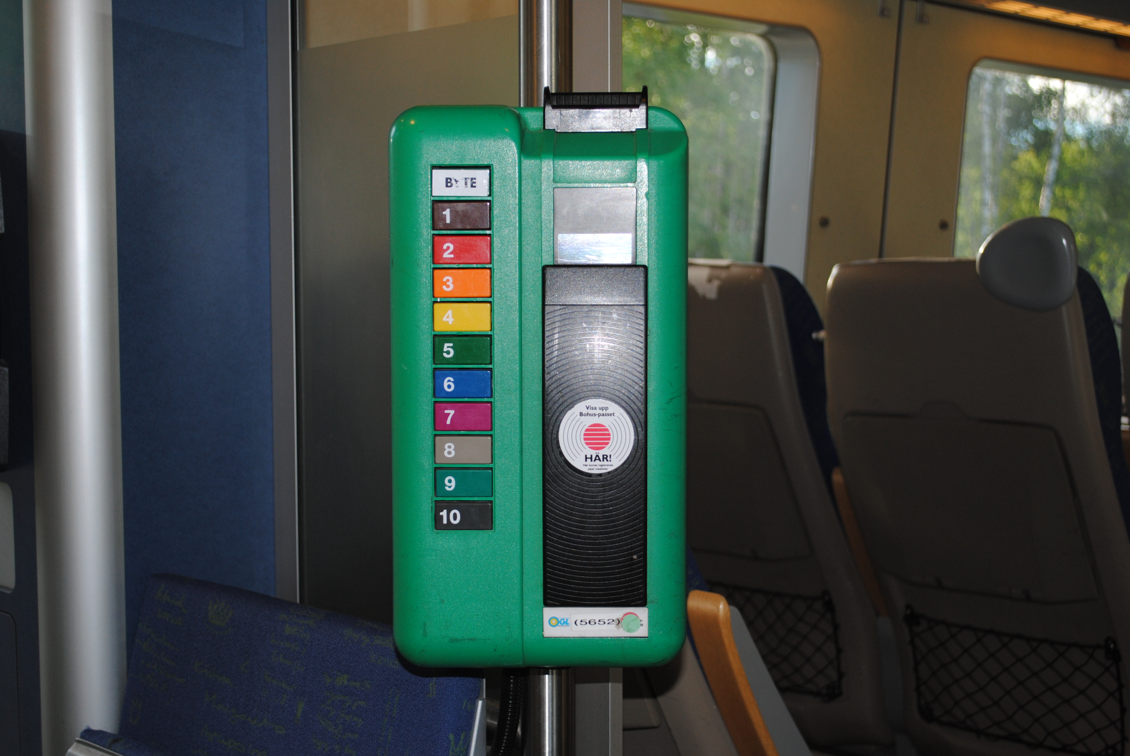 Stämpelmaskin 2